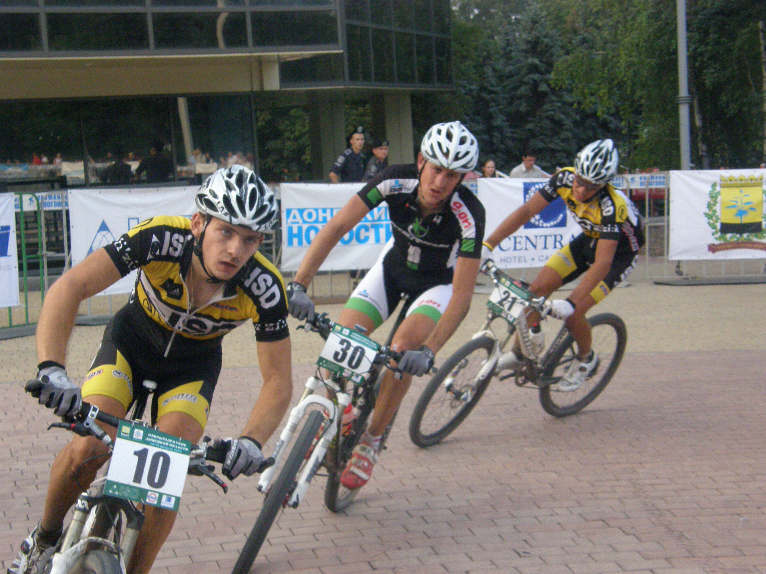 Донецк. Парк культуры и отдыха имени Щербакова. Открытый Кубок Донецкой области по маунтинбайку. Гонка 1-й категории UCI SC ISD CUP.